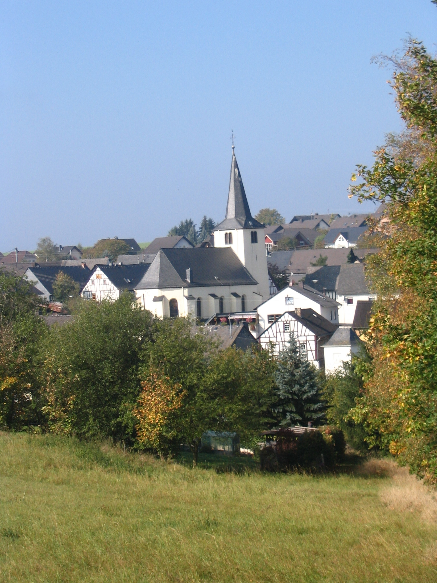 Lieg aus südöstlicher Sicht